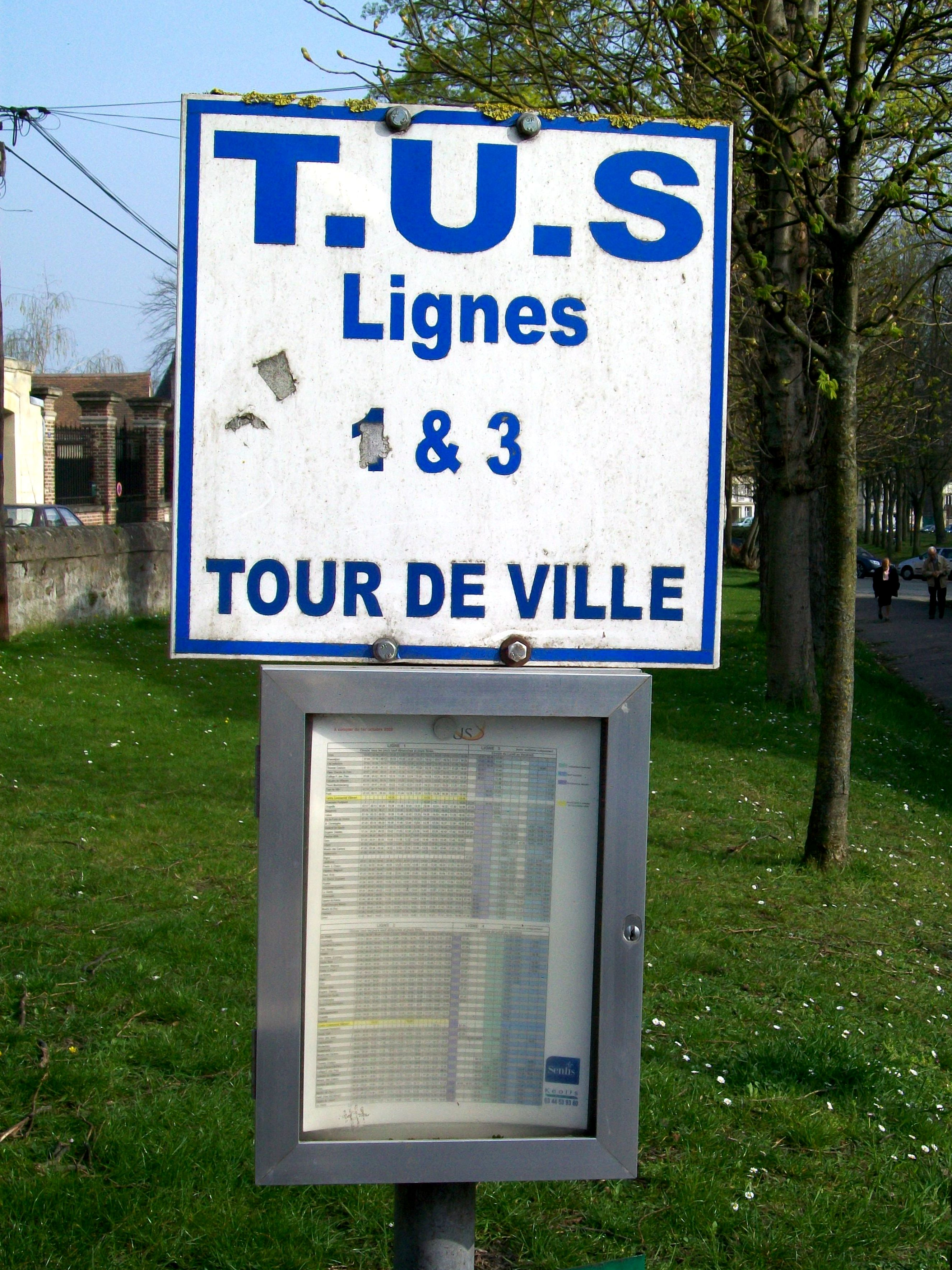 Panneau arrêt des autobus urbains « TUS ». L'arrêt « Tour de Ville » sur l'avenue du maréchal Foch est proche de la gare routière et directement en face de l'arrêt « Grand Cerf » du même réseau.